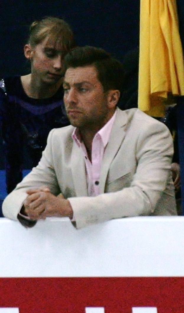 Вахтанг Мурванидзе, в качестве тренера израильского одиночника Алексей Быченко, на чемпионате мира по фигурному катанию 2012